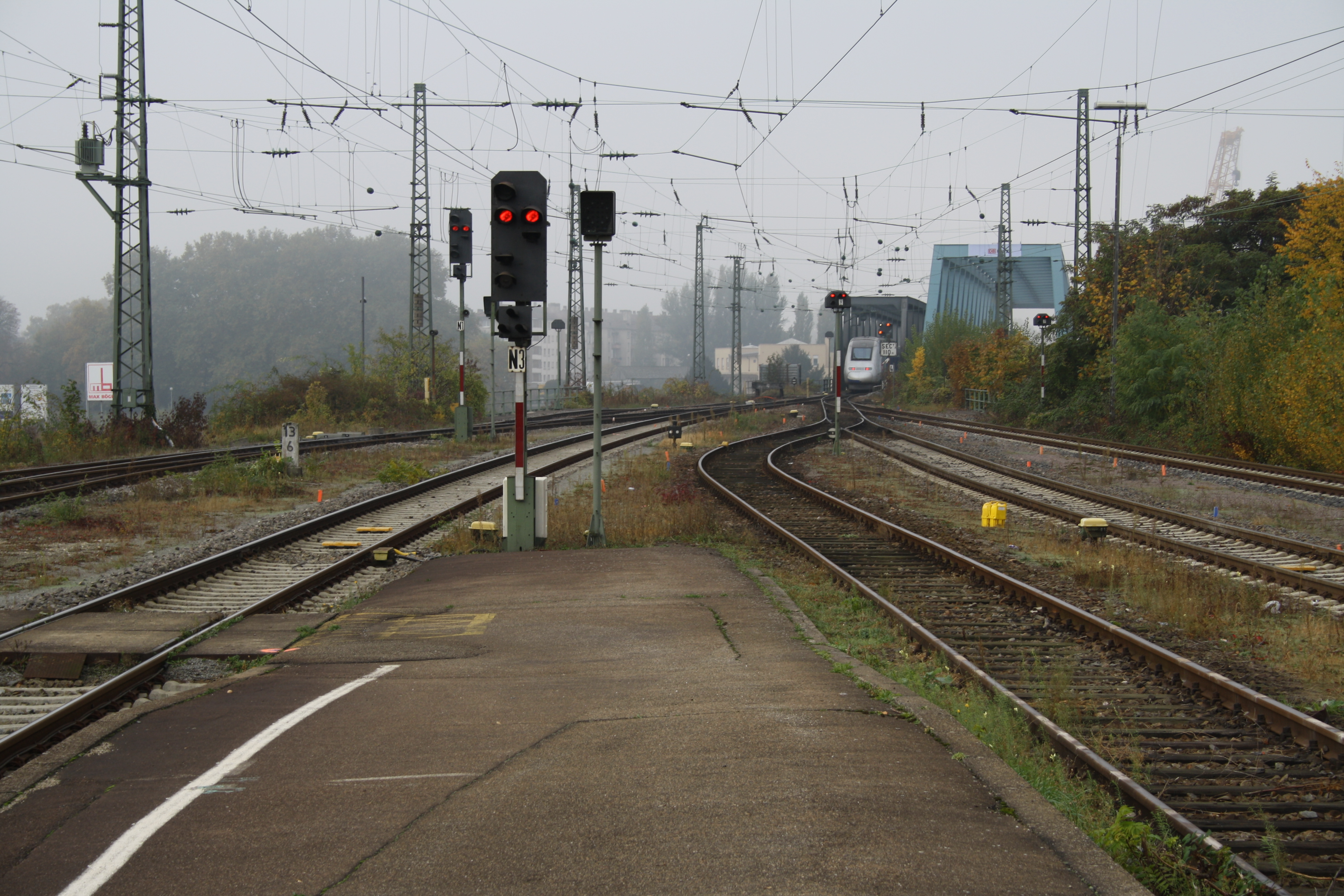 Rheinbrücken am Bahnhof Kehl